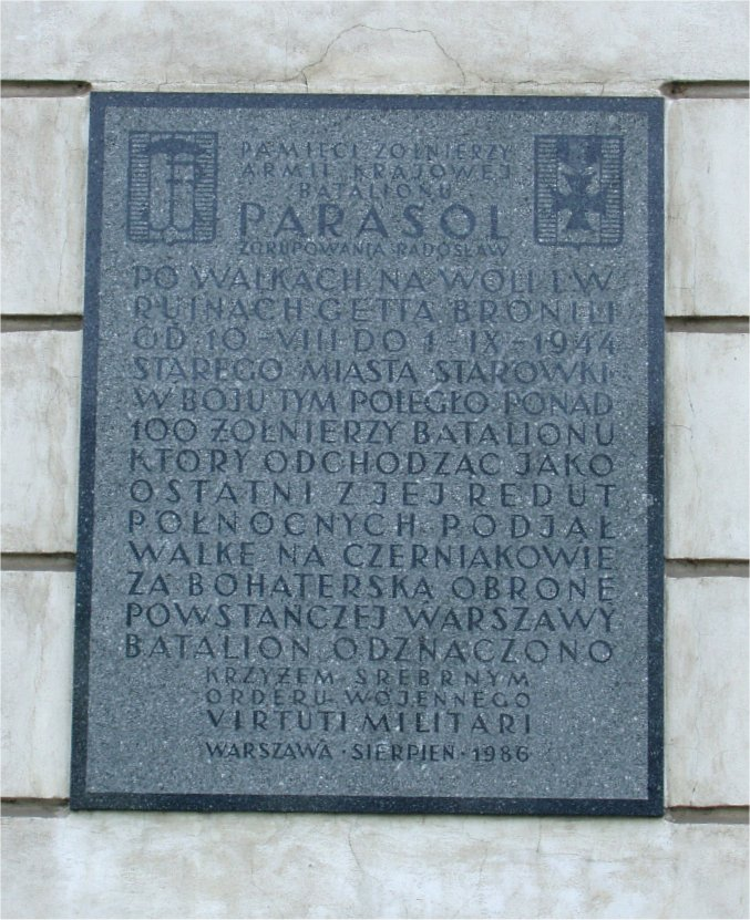 tablica pamiątkowa na pałacu Krasińskich przy placu Krasińskich w Warszawie (fot Zu)